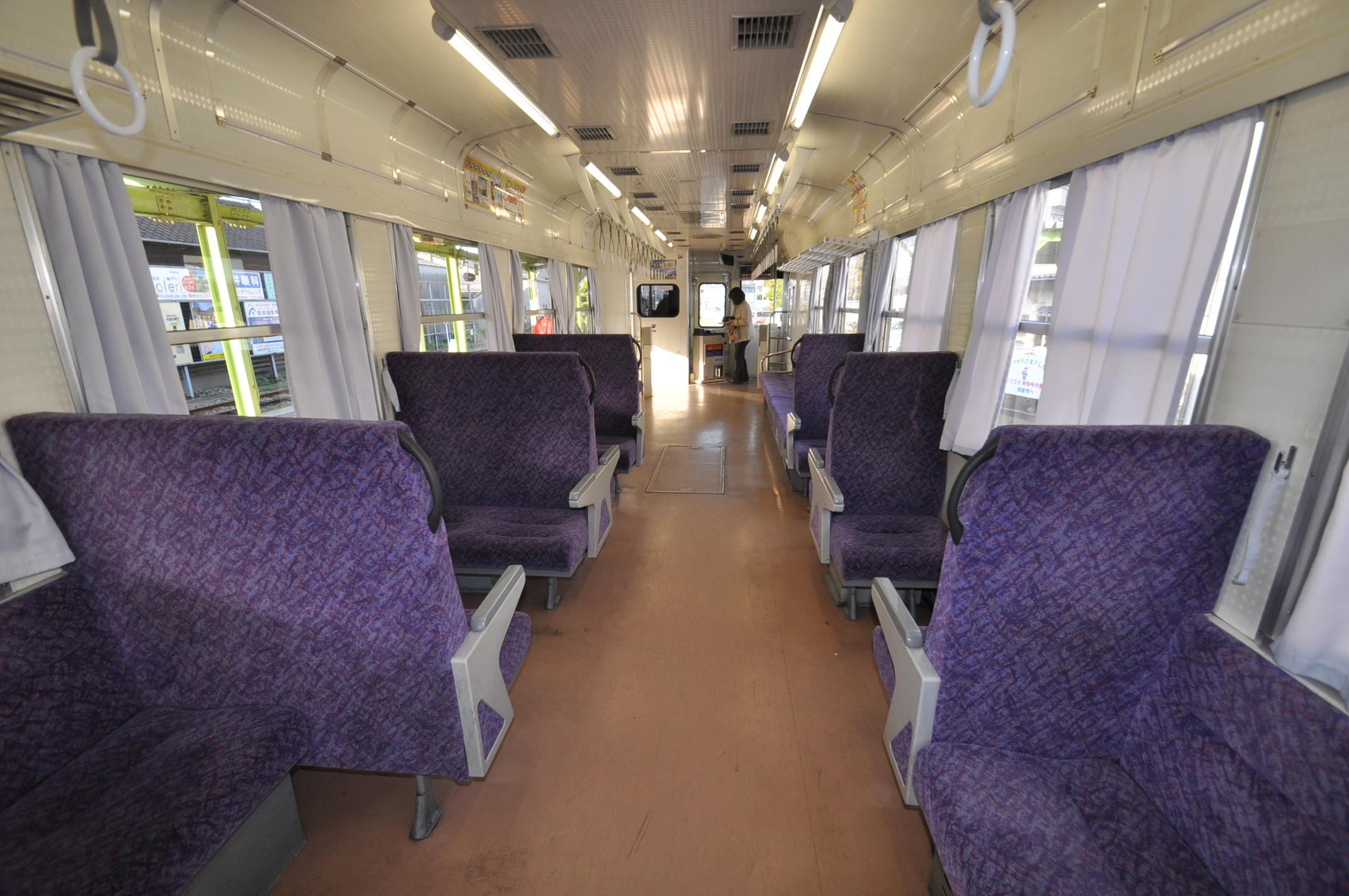 甘木鉄道ＡＲ３００形気動車（車内）